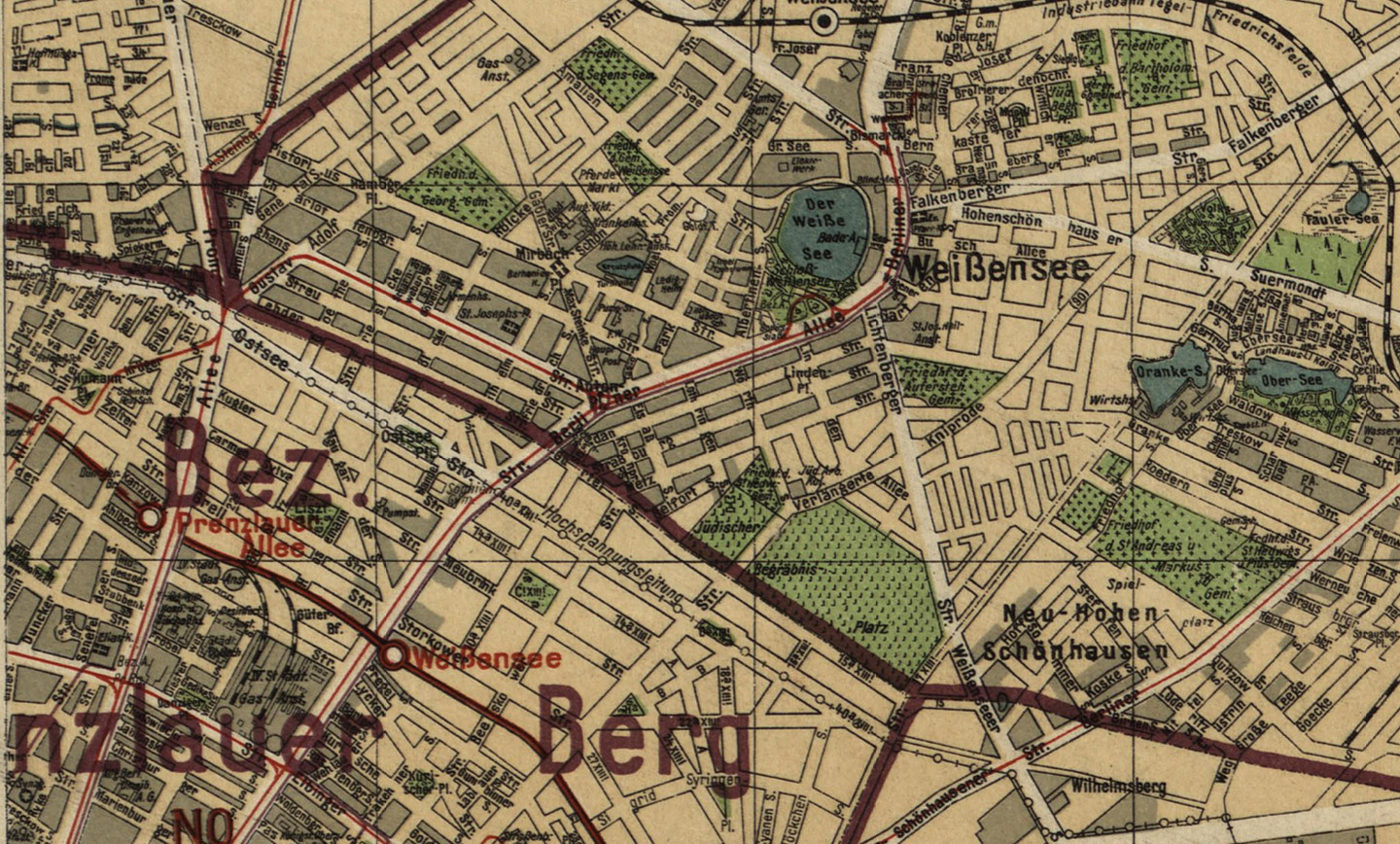 Silva-Übersichtsplan von der Stadt Berlin und ihren 20 Verwaltungsbezirken : auf Grund des Gesetzes vom 27. April 1920 / bearb. und hrsg. von Willy Holz * Format: ca 163 x 117 cm * Orientierung: Nord * Maßstab: 1: 30 000 (Innenstadt 1: 20 000) * 2 Blätter, mehrfarbig